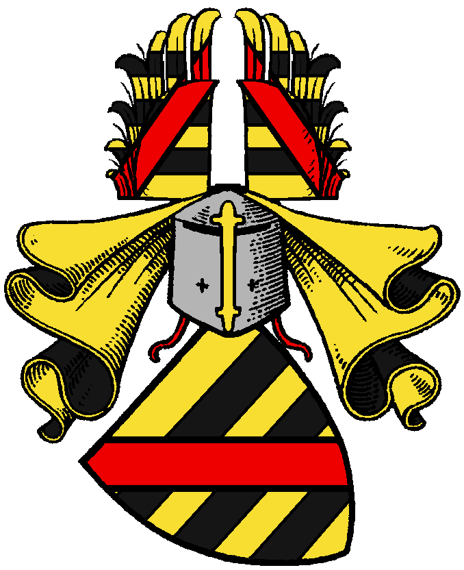 Stammwappen der von dem Broel(e) (anders) genannt Plater (auch: von Plater; Plater, anders genannt von Brüelen; von dem Broel-Plater; Plater-Syberg bzw. Plater-Zyberk bzw. von dem Broel-Plater genannt von Syberg zu Wischling) -westfälischer Uradel der Grafschaft Mark mit dem Stammhaus Broel (seit dem 15. Jh. wüst): In Gold drei schwarze Balken, überlegt mit einem roten Schrägbalken; auf dem Helm mit schwarz-goldenen Decken ein offener, wie der Schild bezeichneter Flug. (Wahlspruch: "Melior mors macula".)